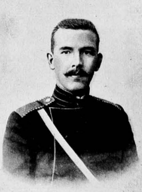 Лев Александрович Велихов в мундире вольноопределяющегося Гвардейской Конно-Артиллерийской бригады.